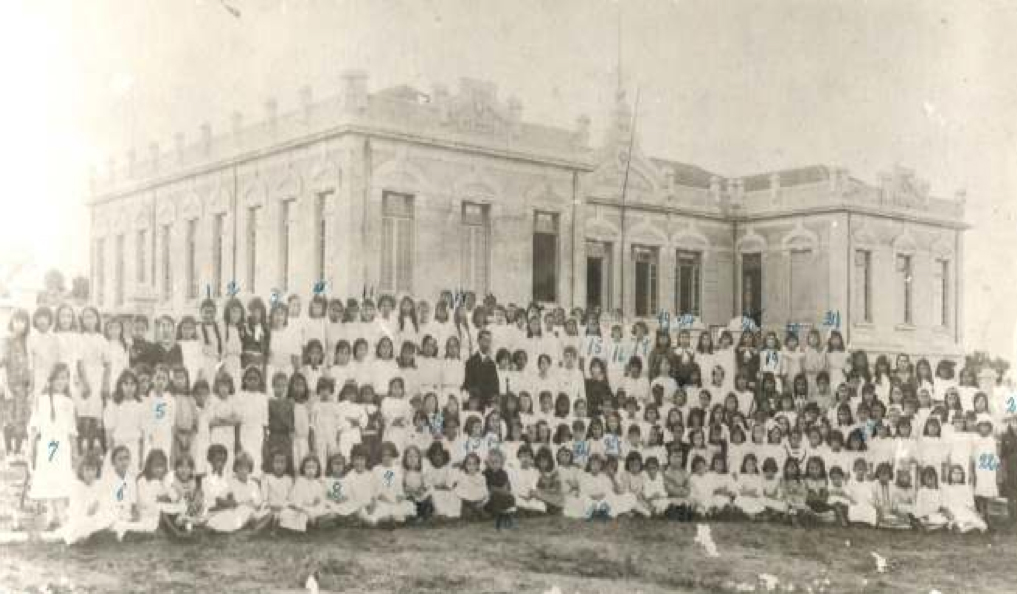 Ludgero Prestes (diretor, no centro, de paletó negro) e seus alunos no Grupo Escolar de Bebedouro (São Paulo), 1913